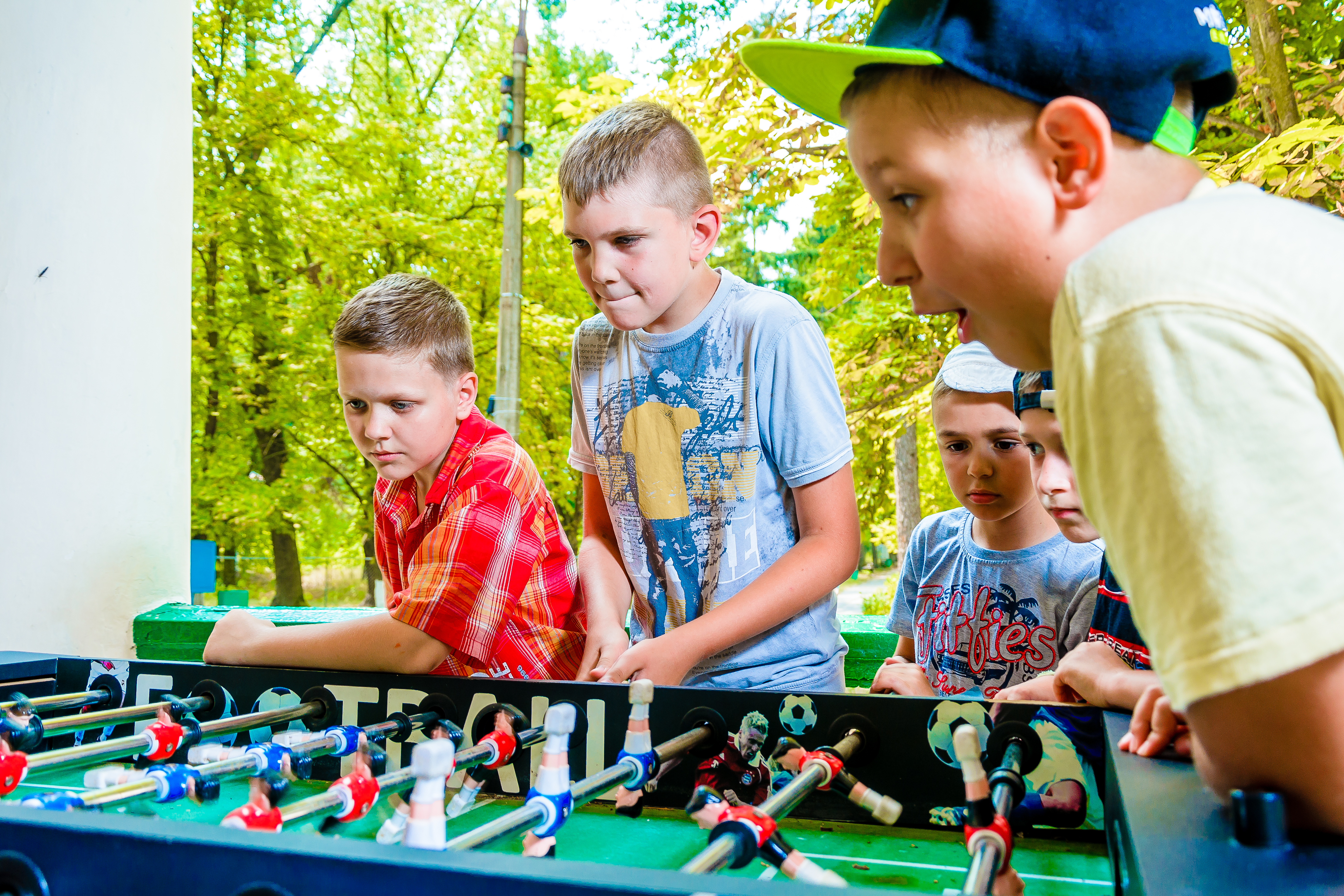 активності